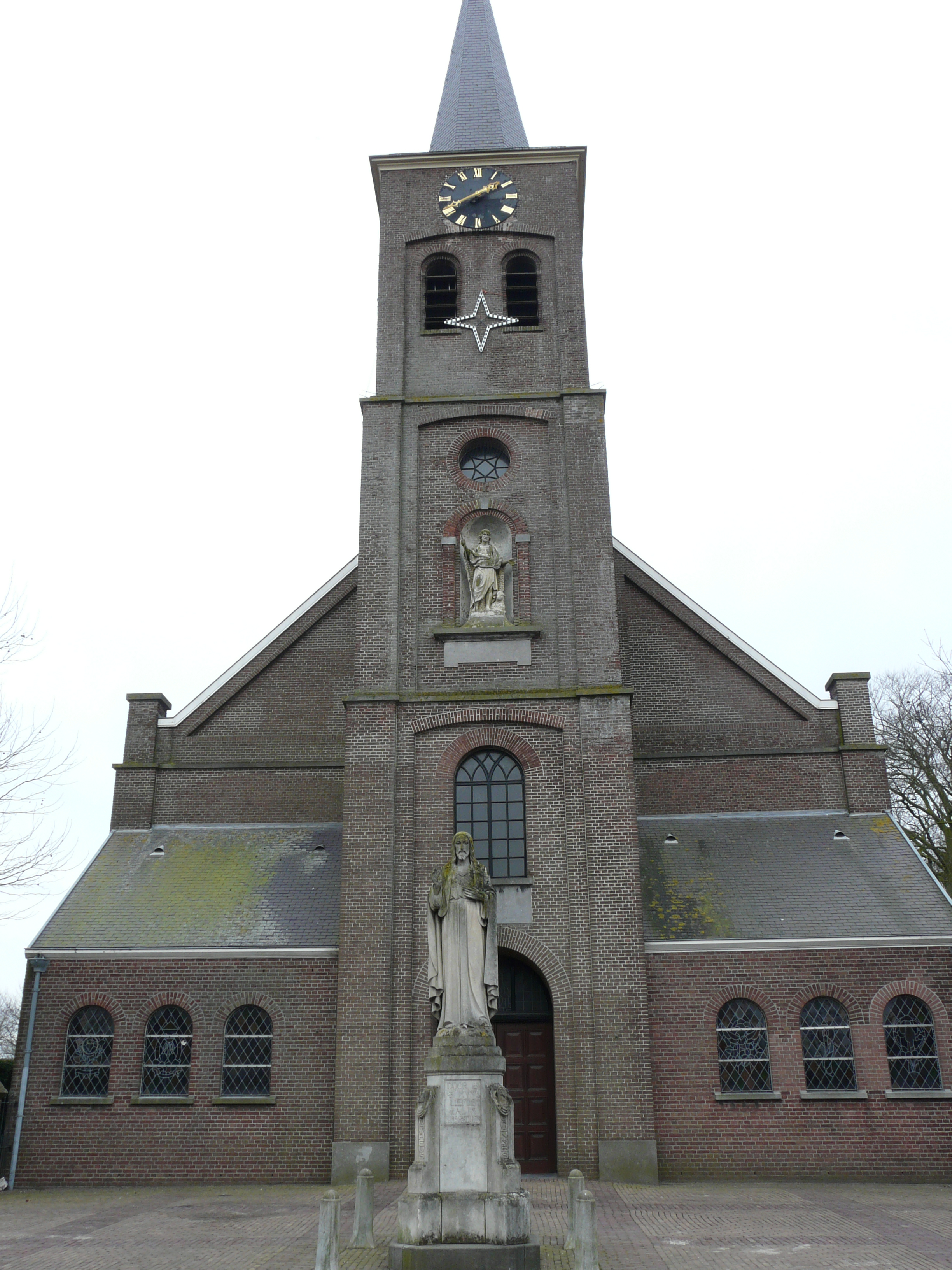 Sint Joannes de Doper kerk